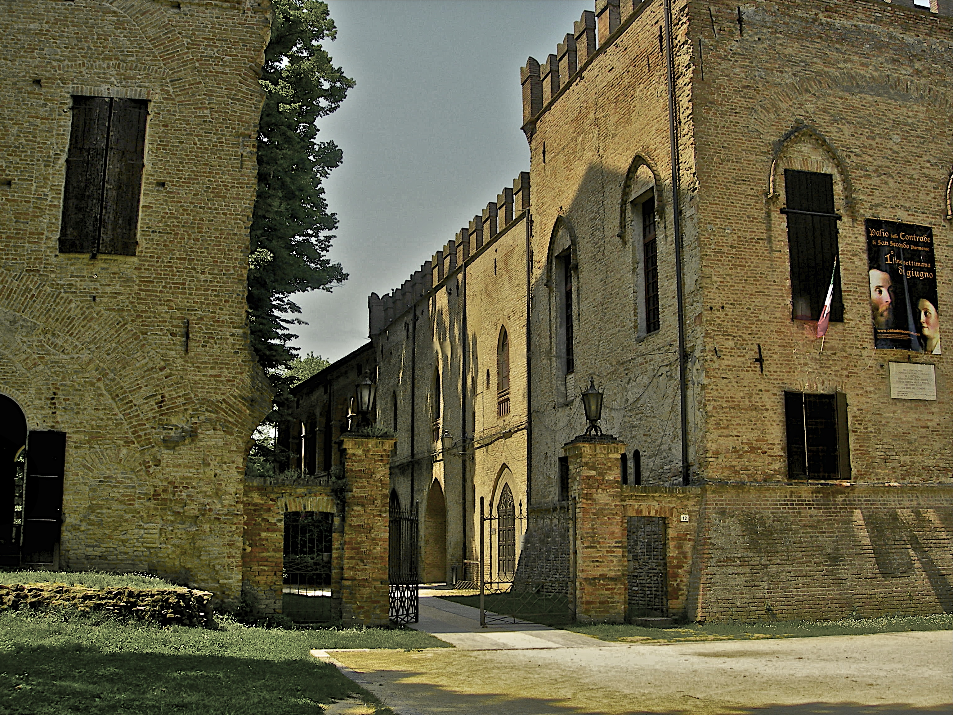 Rocca dei Rossi di San Secondo Parmense - MIBAC This is a photo of a monument which is part of cultural heritage of Italy.